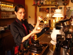 Frisch gezapftes Bier!